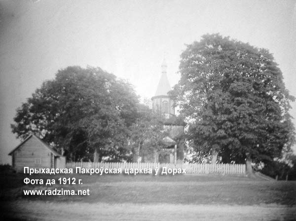 Беларуская (тарашкевіца): Доры (Dory). Царква